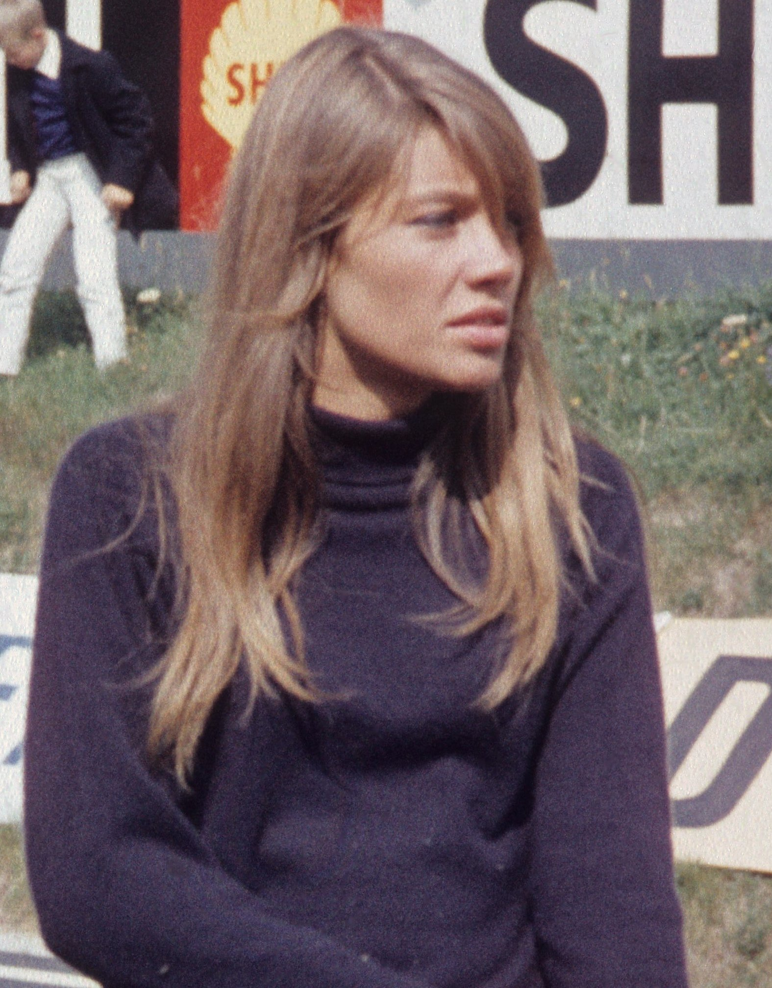 La chanteuse (et ici actrice) française Françoise Hardy lors du tournage du film Grand Prix, sur le circuit de Charade, en août 1966.